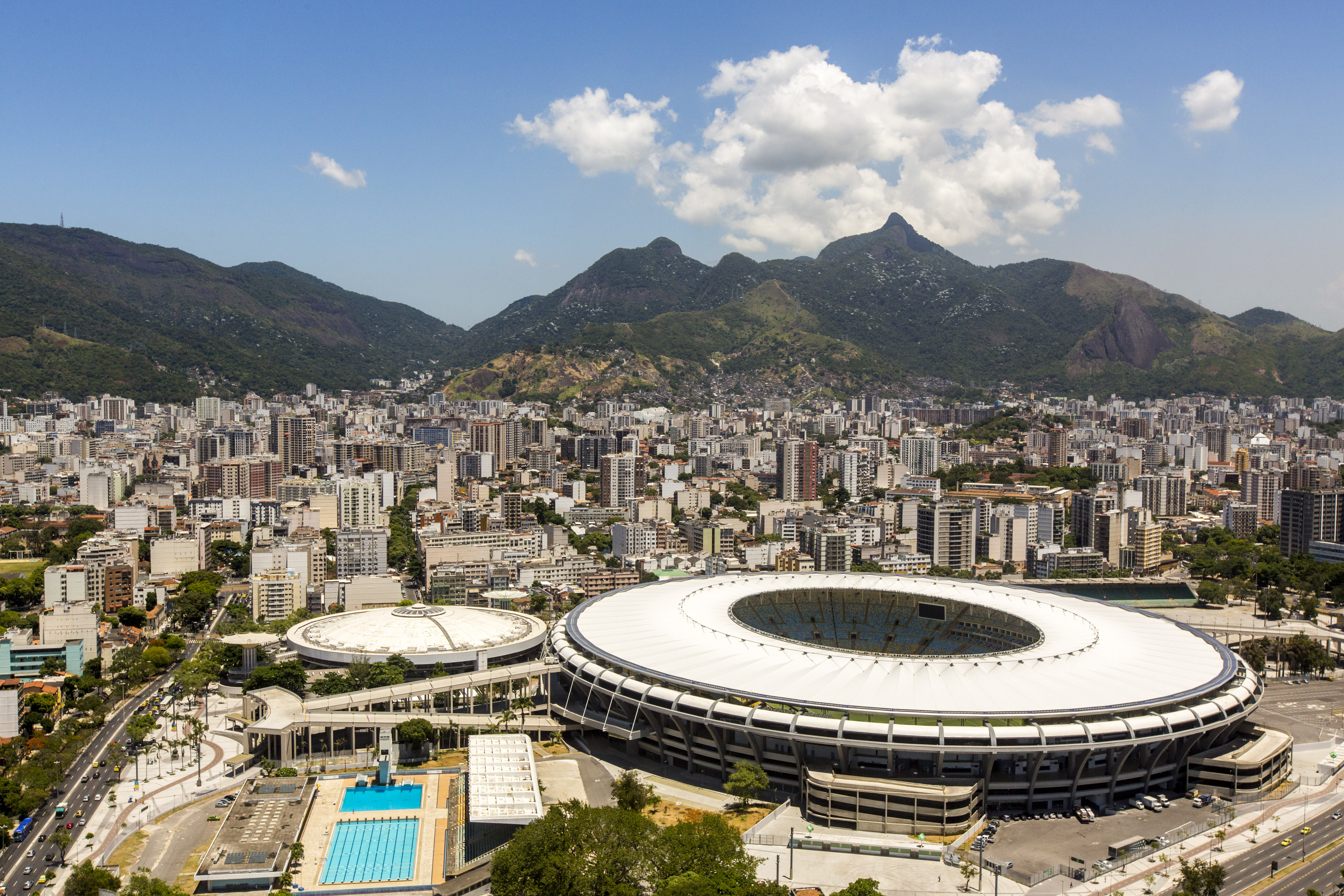 Estádio Jornalista Mário Filho, mais conhecido como Maracanã. Foto de fevereiro de 2014.